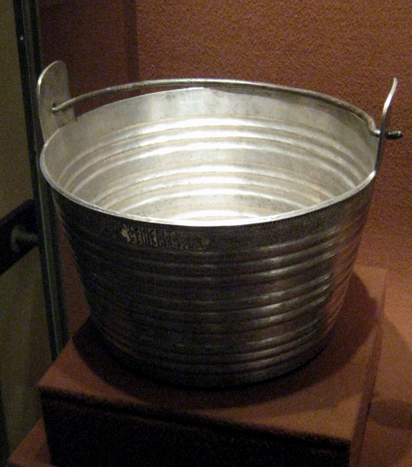 Ведро. Принадлежало боярину В.И. Стрешневу. Москва, Кремлевские мастерские, 1640-е. Серебро, чеканка, резьба